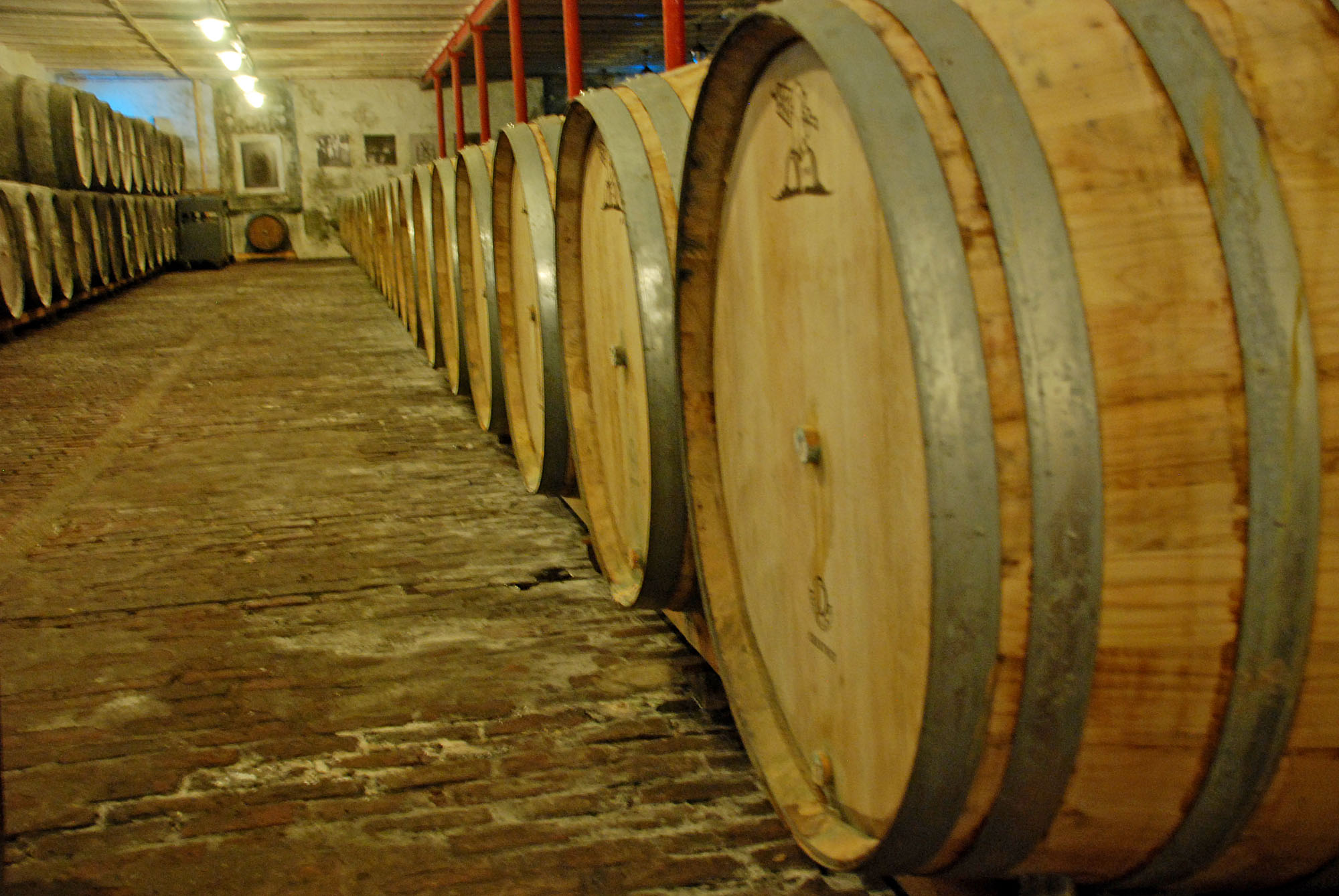 Brouwerij Timmermans, België